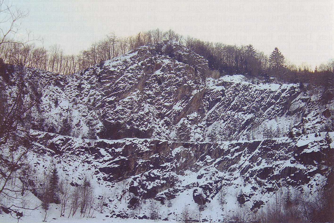 Ehemalige Hillebrandt Steinbruch Burg-Ost im Naturschutzgebiet An der Rösenbecker Burg.